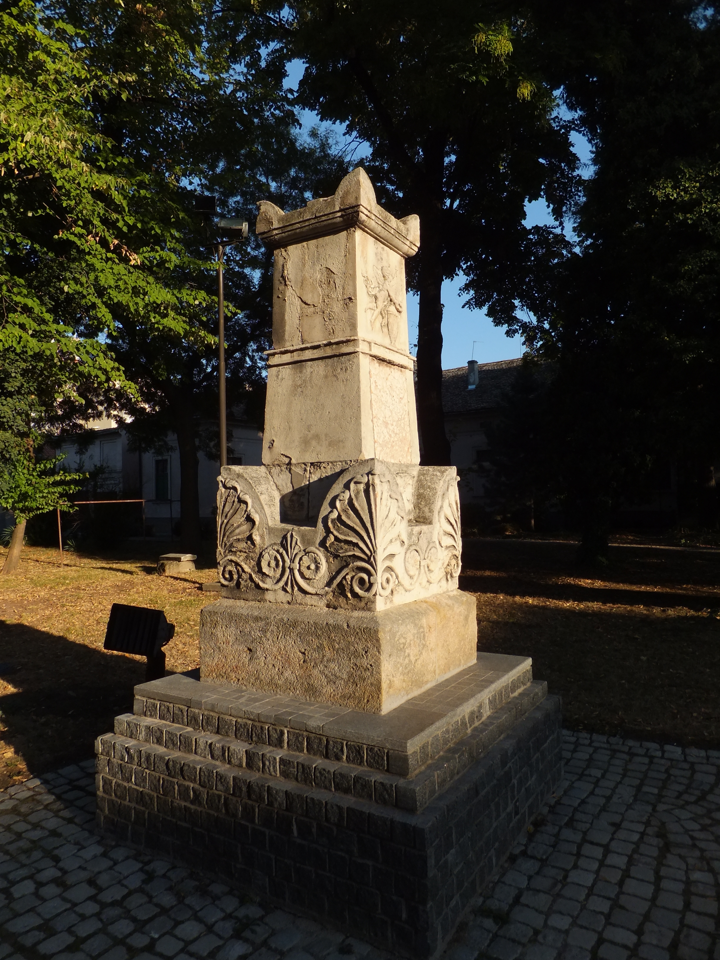 Споменик оснивачима Панчевачке гимназије